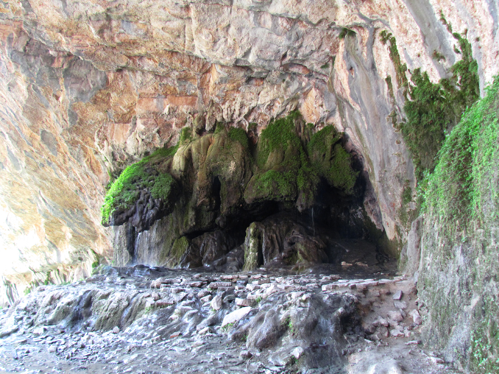 Eqlid - Sedeh - Tangeh Boragh